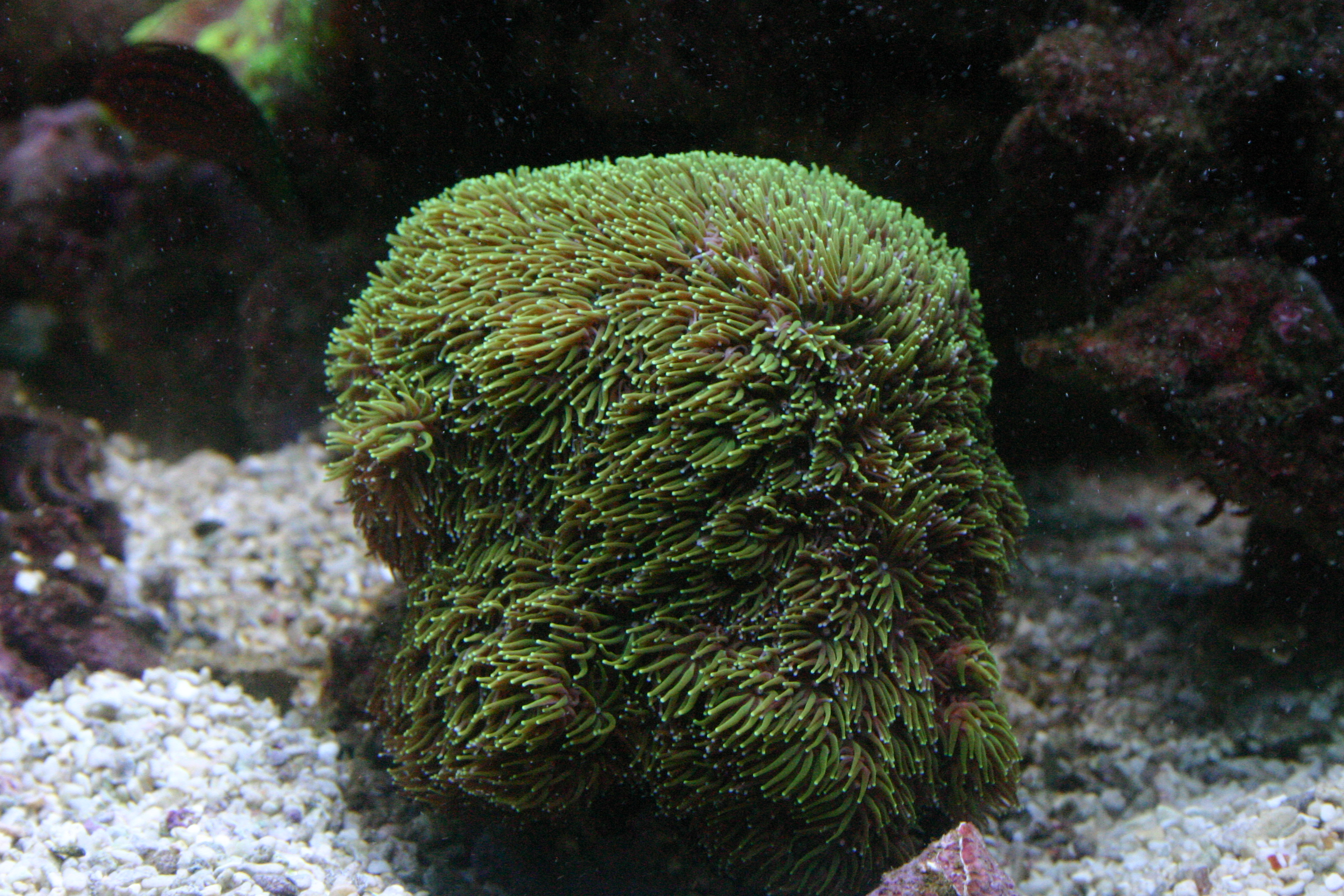 Galaxea fascicularis en acuario de arrecife